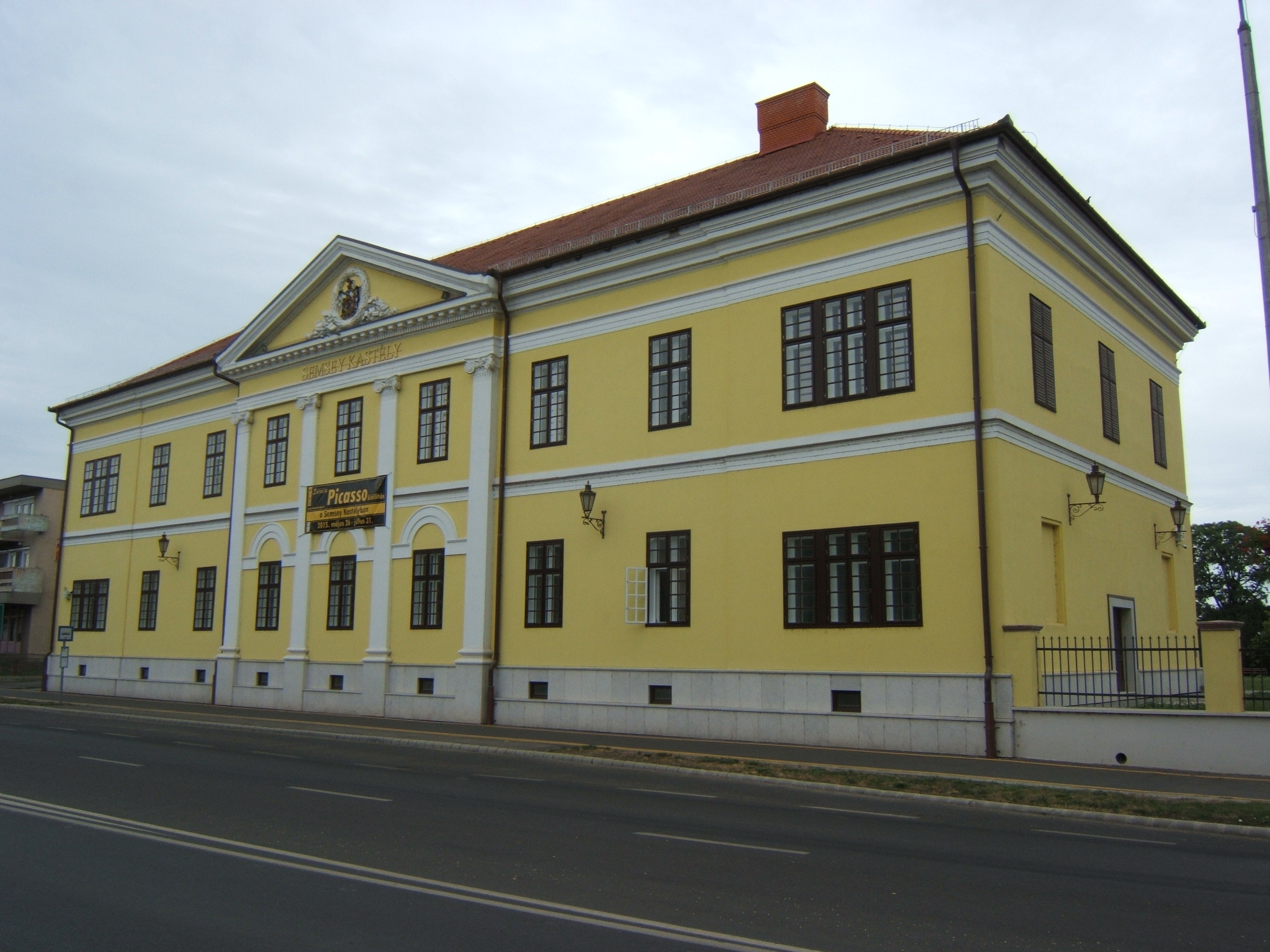 Balmazújváros, kastély